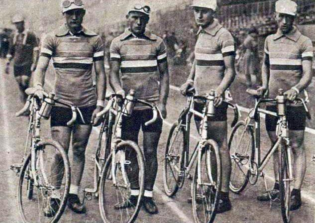 L'équipe de France de cyclisme championne olympique sur route en 1924 (2).